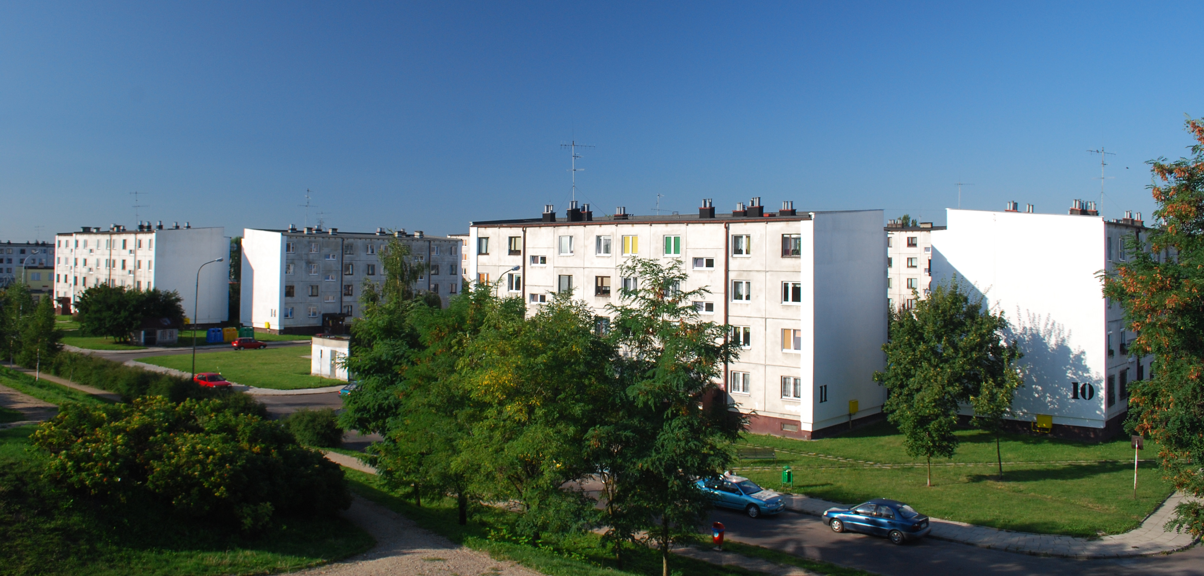 Osiedle MSM (tzw. "Białe") na Widzewie Wschodzie w Łodzi - panorama z Górki Widzewskiej.